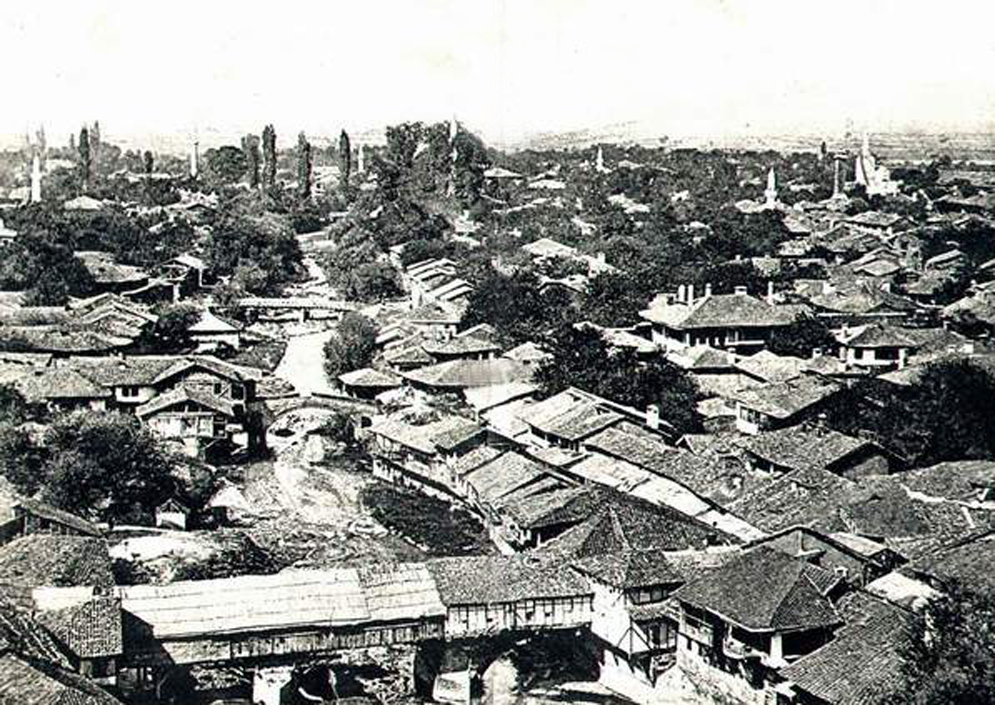 Prizren'in Osmanlı İmparatorluğu döneminin sonlarına veya Yugoslavya Krallığı başlarına ait bir fotoğrafı.